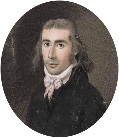 Reinier Willem Tadama (1771-1812)